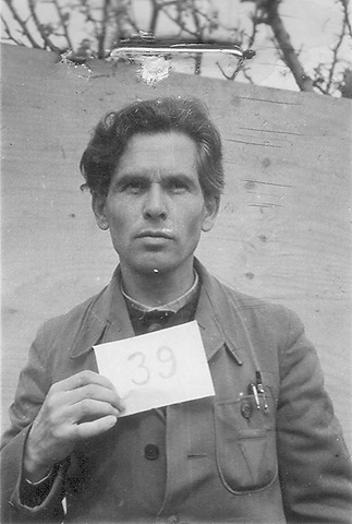 Otto Halle, ehemaliger deutscher Häftling (Haft-Nr. 869), mit der Nummer 39.